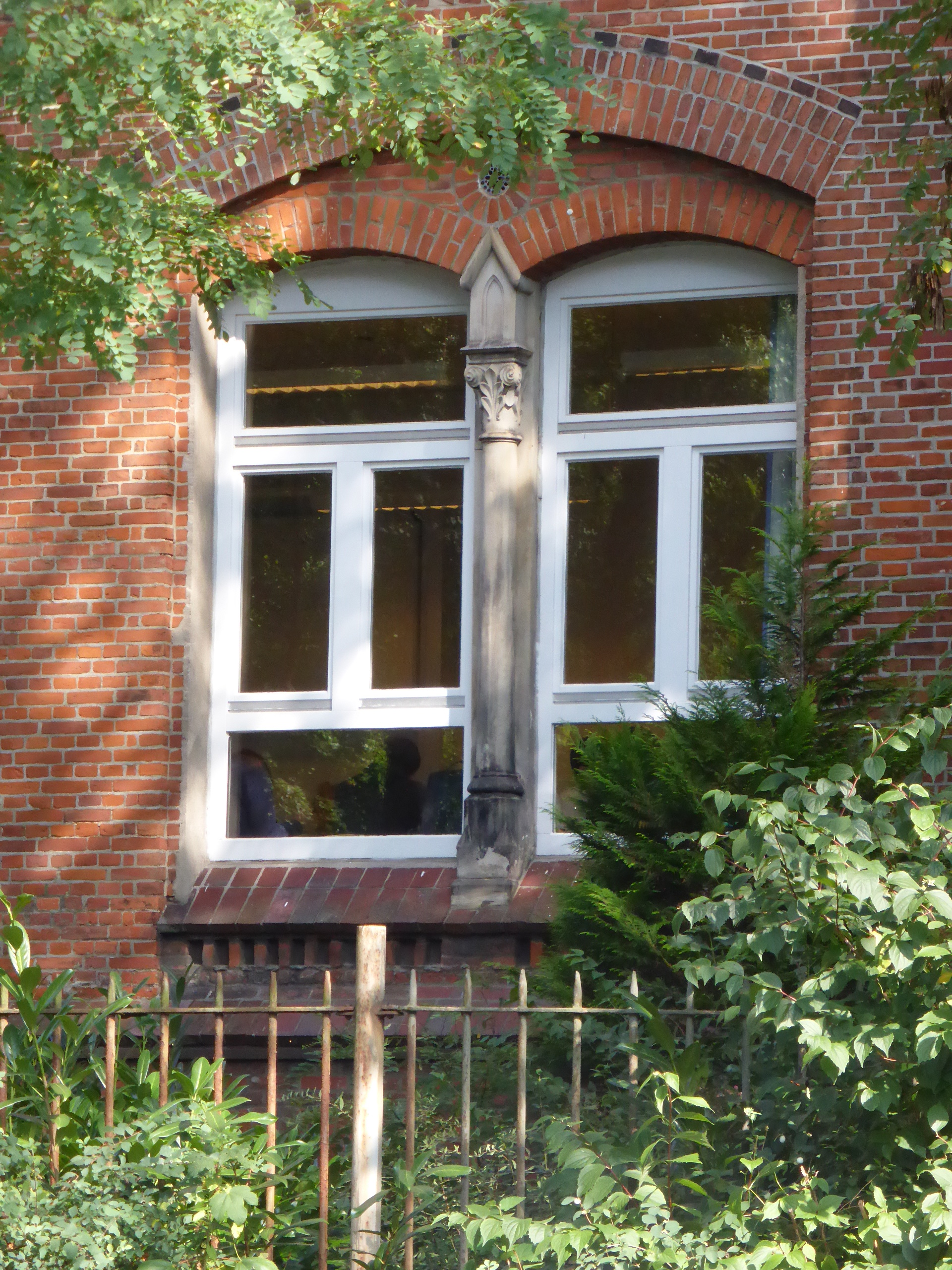 Im Erdgeschoss des Schulgebäudes Paulinum steckt historische Bausubstanz der Vorkriegs-Wichernschule, da dieses Gebäude 1943 nur das Dach verlor und im Obergeschoss ausbrannte.